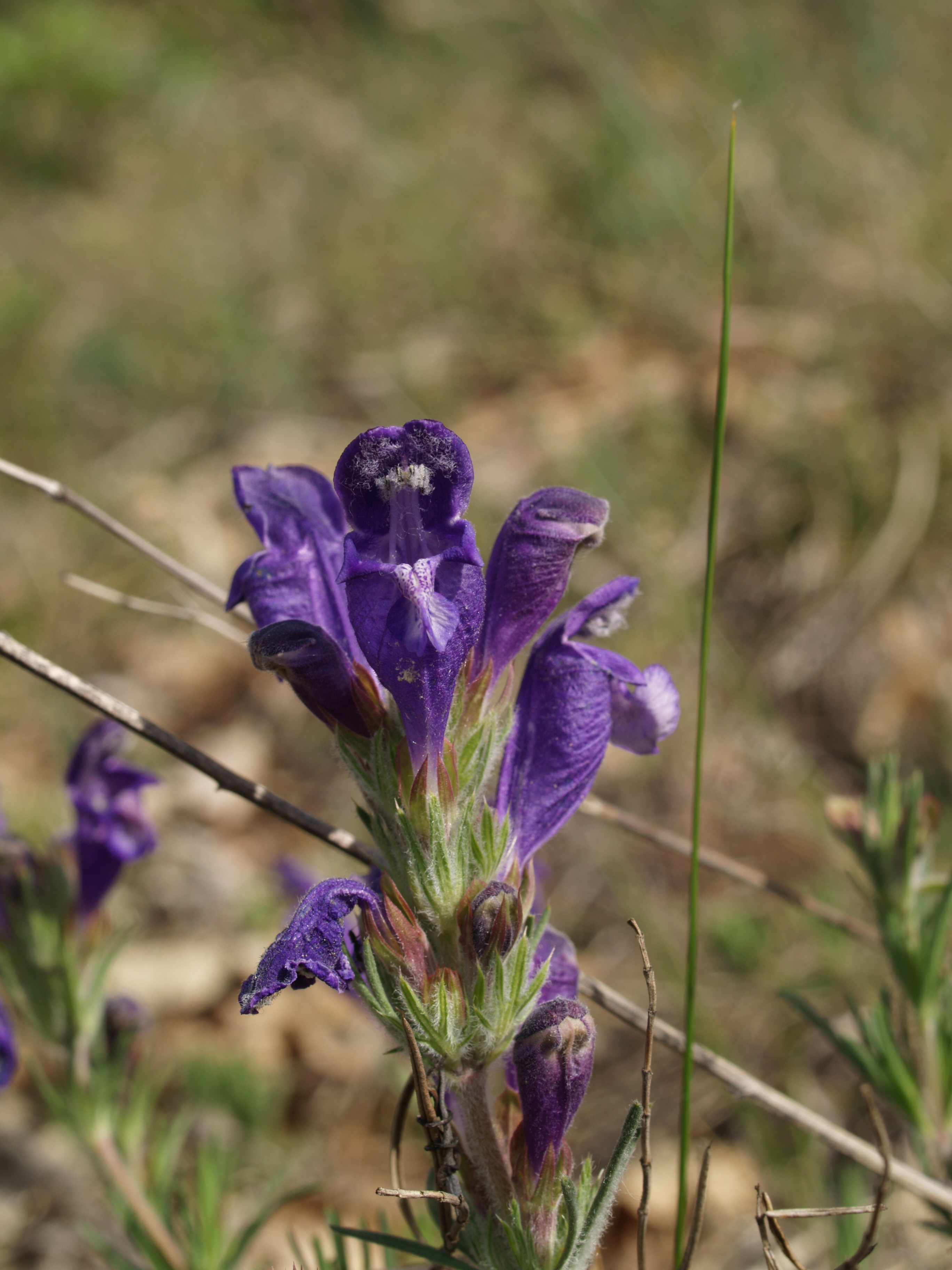 Koda (národní přírodní rezervace) - Dracocephalum austriacum L., včelník rakouský - status ohrožení v ČR: C1 (kriticky ohrožený)